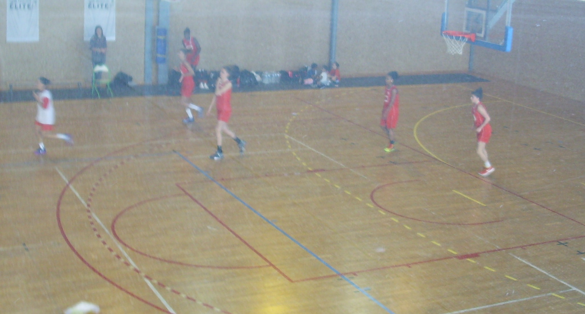 Salle annexe du Colisée avec un match de Nationale féminine 3 entre l'Elan Chalon-Le Creusot et Montferrand